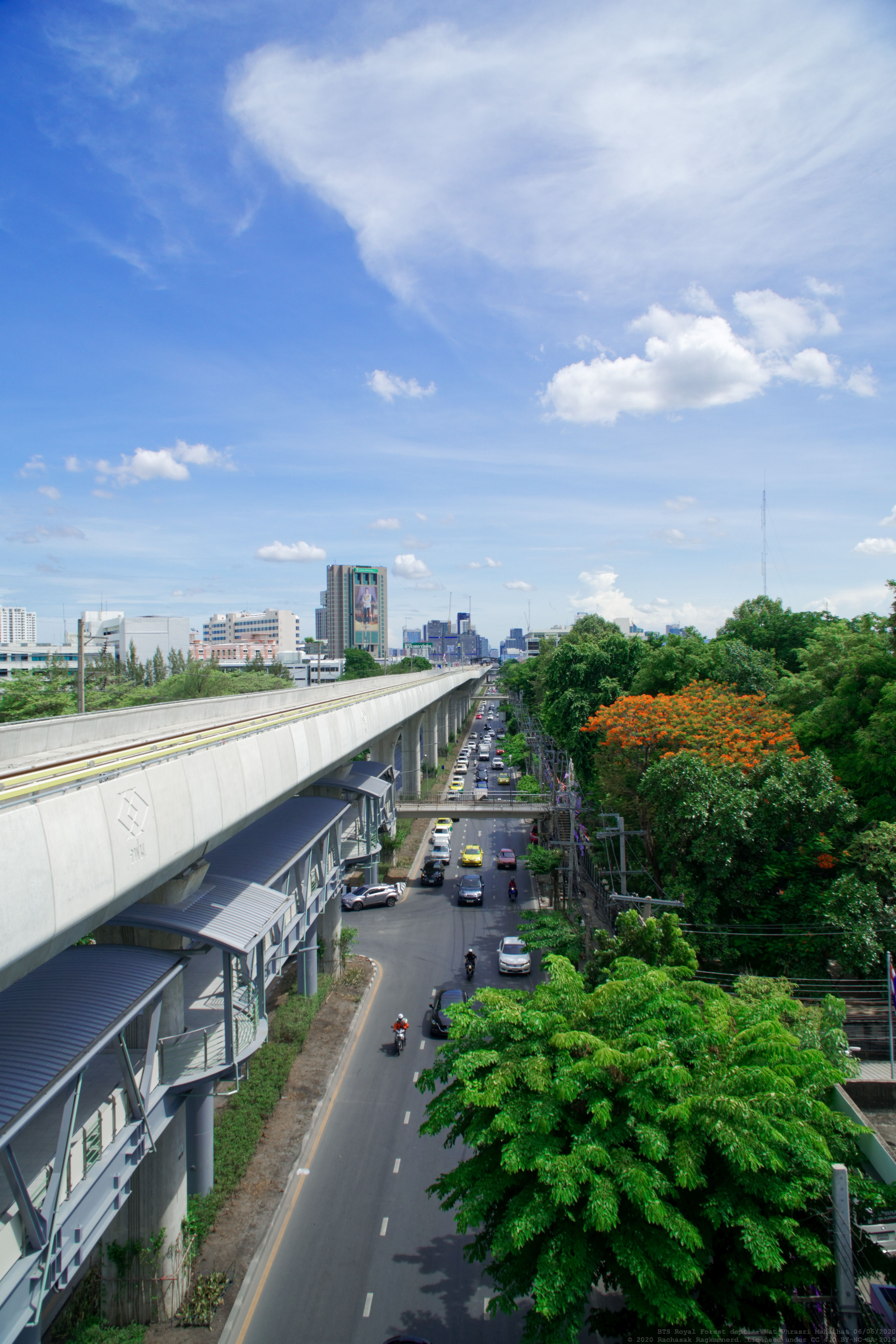 ถนนพหลโยธิน มองลงมาจากสถานีกรมป่าไม้